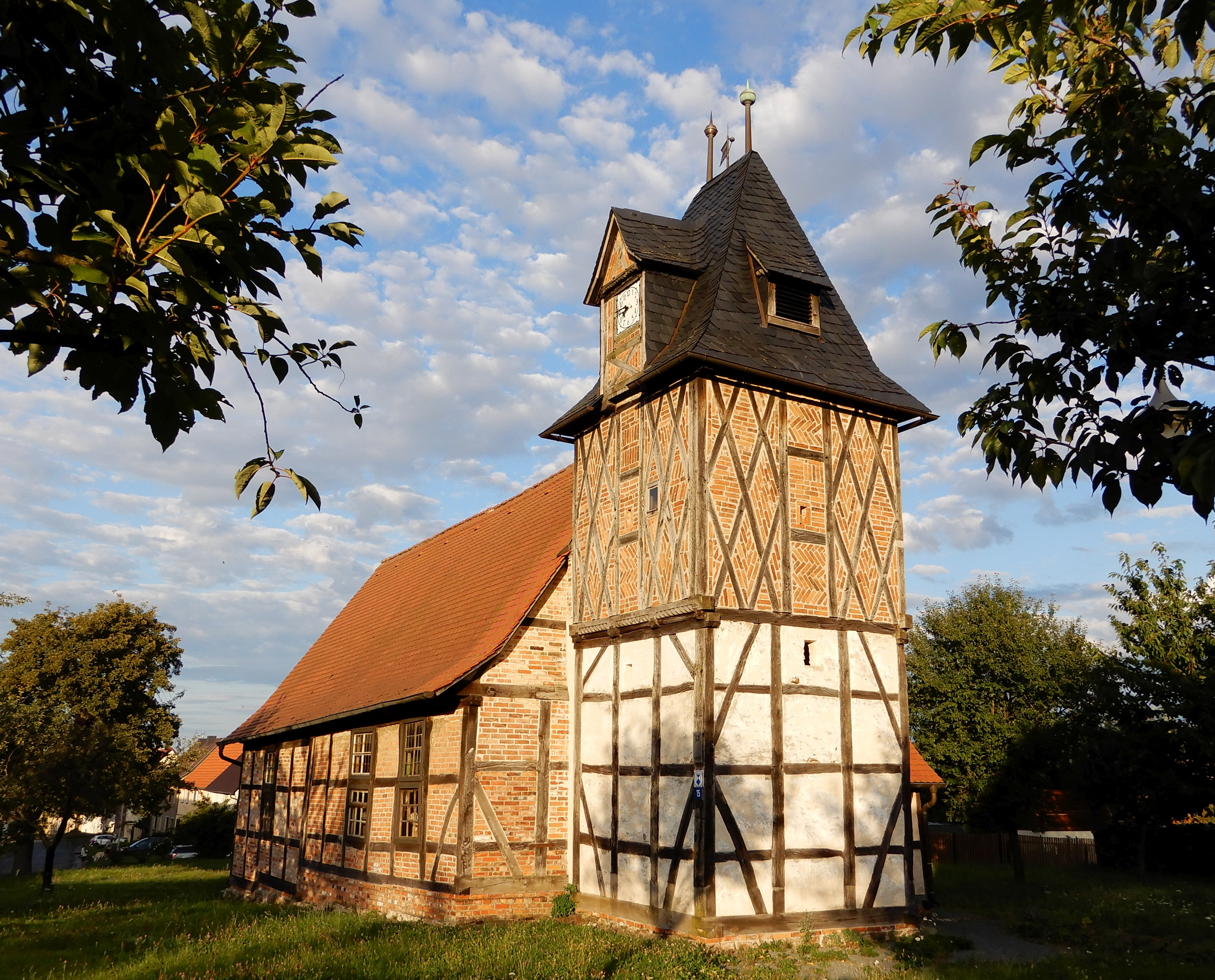 Dorfkirche Wieserode